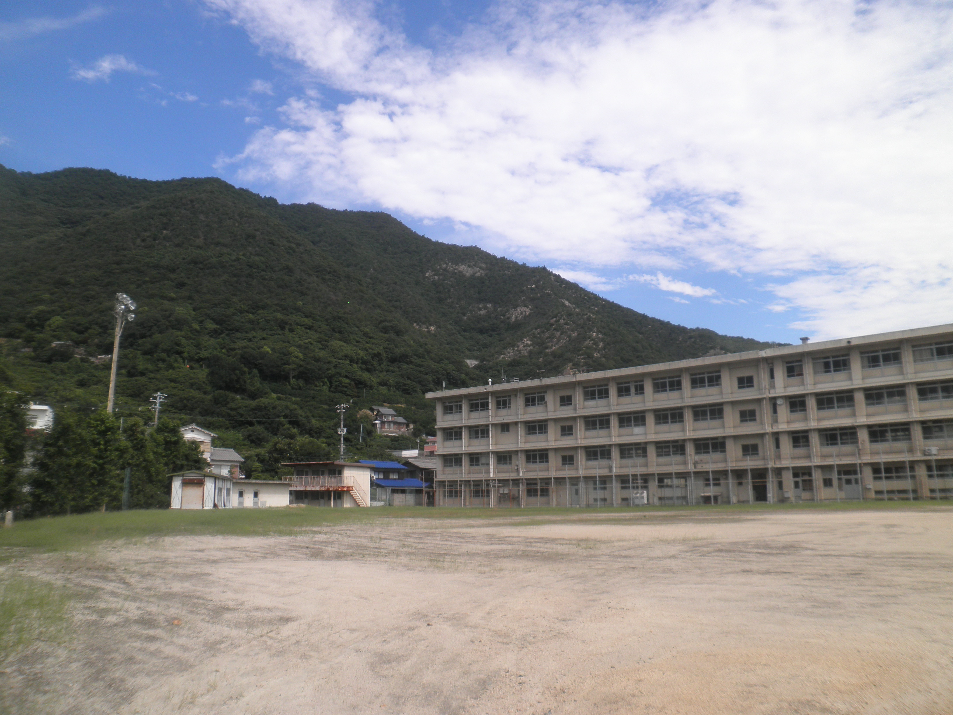 広島県の大崎上島、大崎海星高校木江校舎